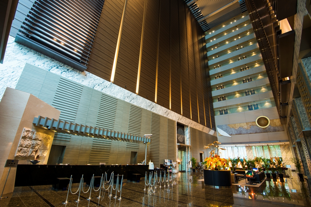 ヴィラフォンテーヌ東京汐留のロビー （吹抜けの高さは40ｍ）